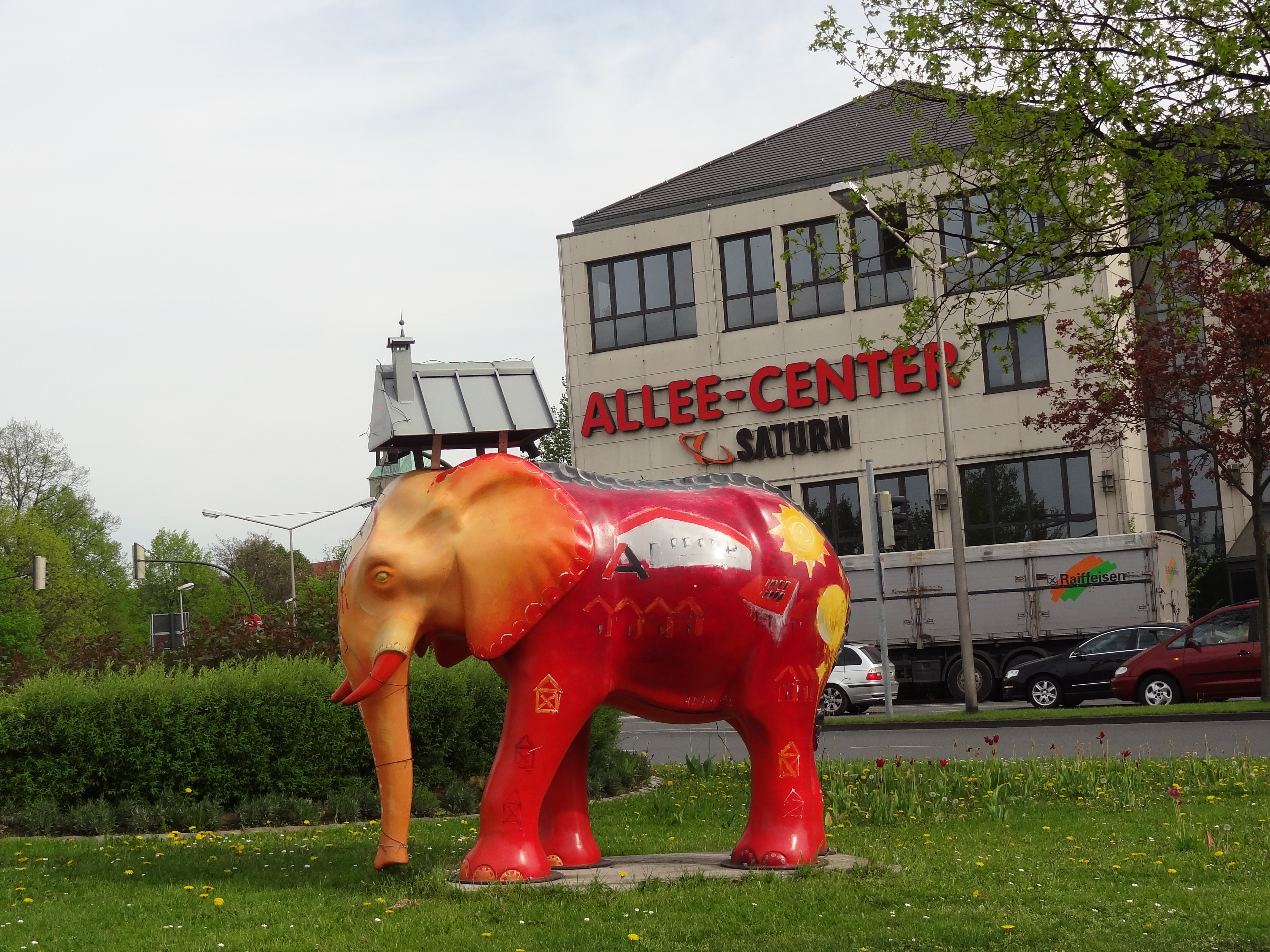 Elefant vorm Allee-Center Hamm